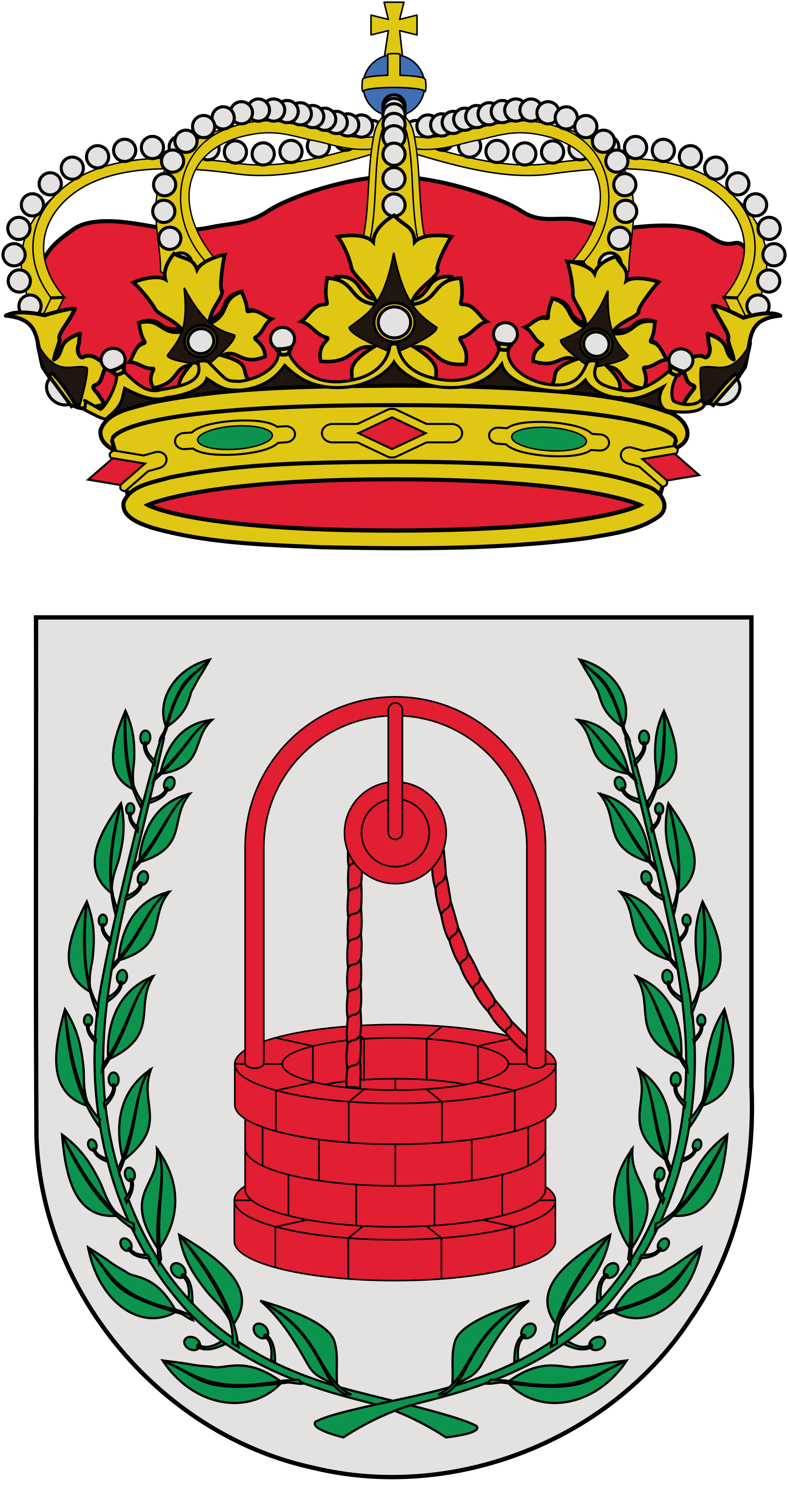 Escudo ayuntamiento de Pozuelo de Zarzón